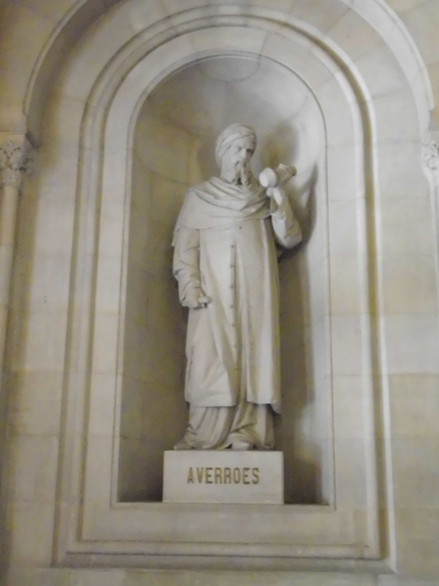 Averrois (Venanci Vallmitjana). Gran Via de les Corts Catalanes, 585 (Vestíbul de la Universitat) (Barcelona)